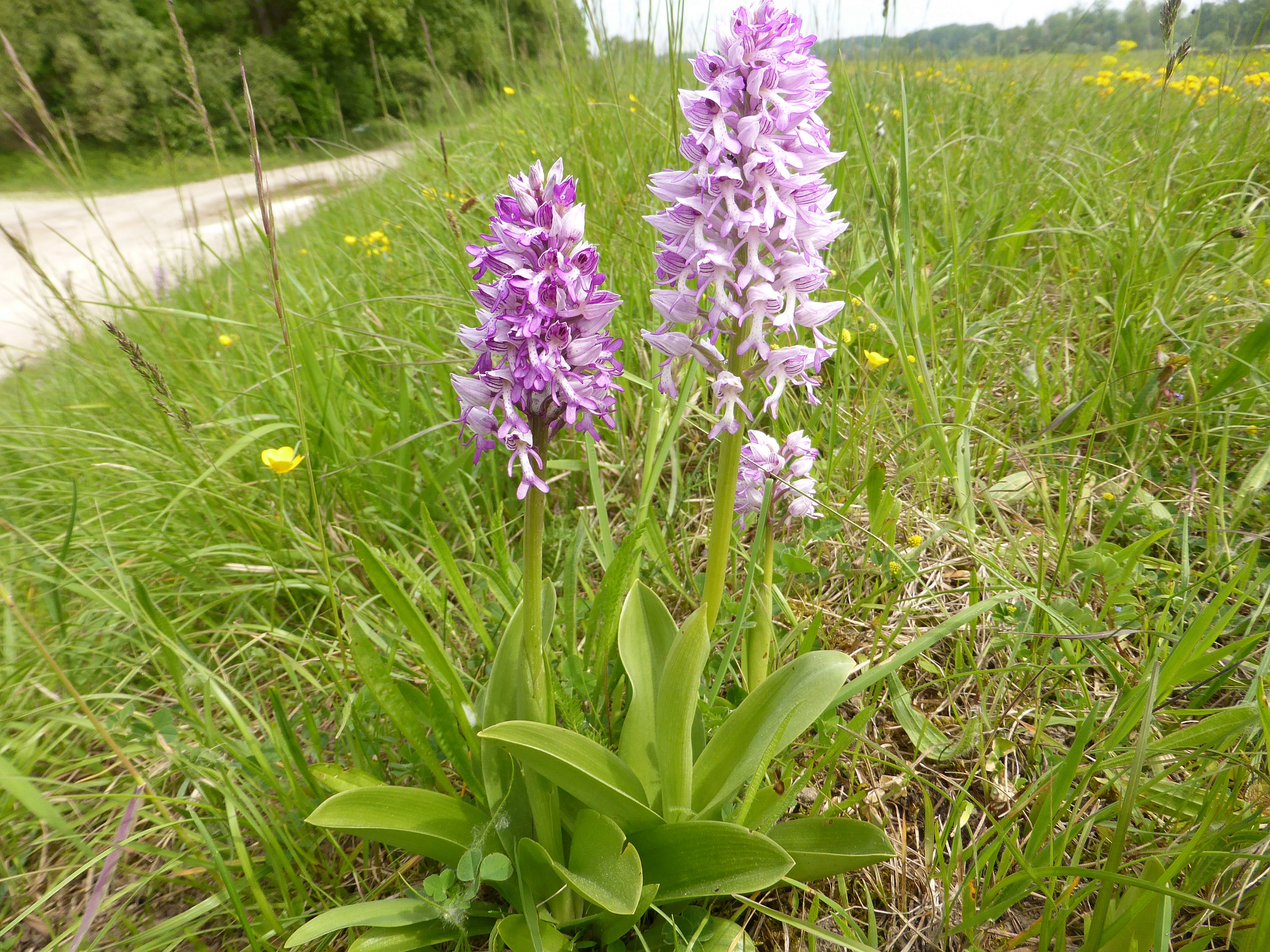 Helm-Knabenkraut (Orchis militaris), Offendorf (Bas-Rhin), 11.05.2017